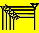 É (e-2; cuneiforme) sumerico: lett. "casa", intesa anche come "casa" di un dio, quindi "tempio", "santuario". In accadico: bītu, assiro: bētu. Unicode colorato di giallo.